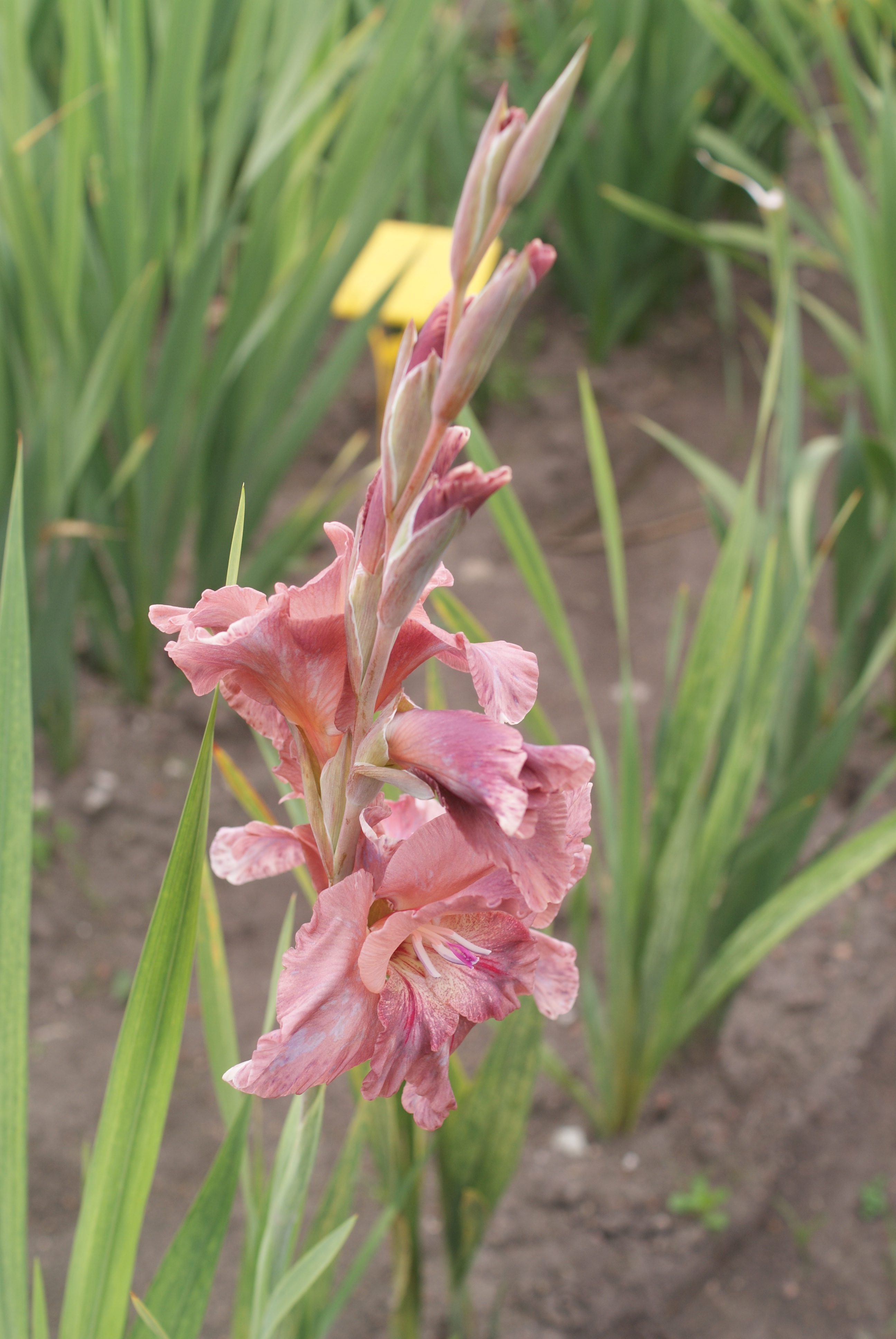 Gladiplus 'Papeete'